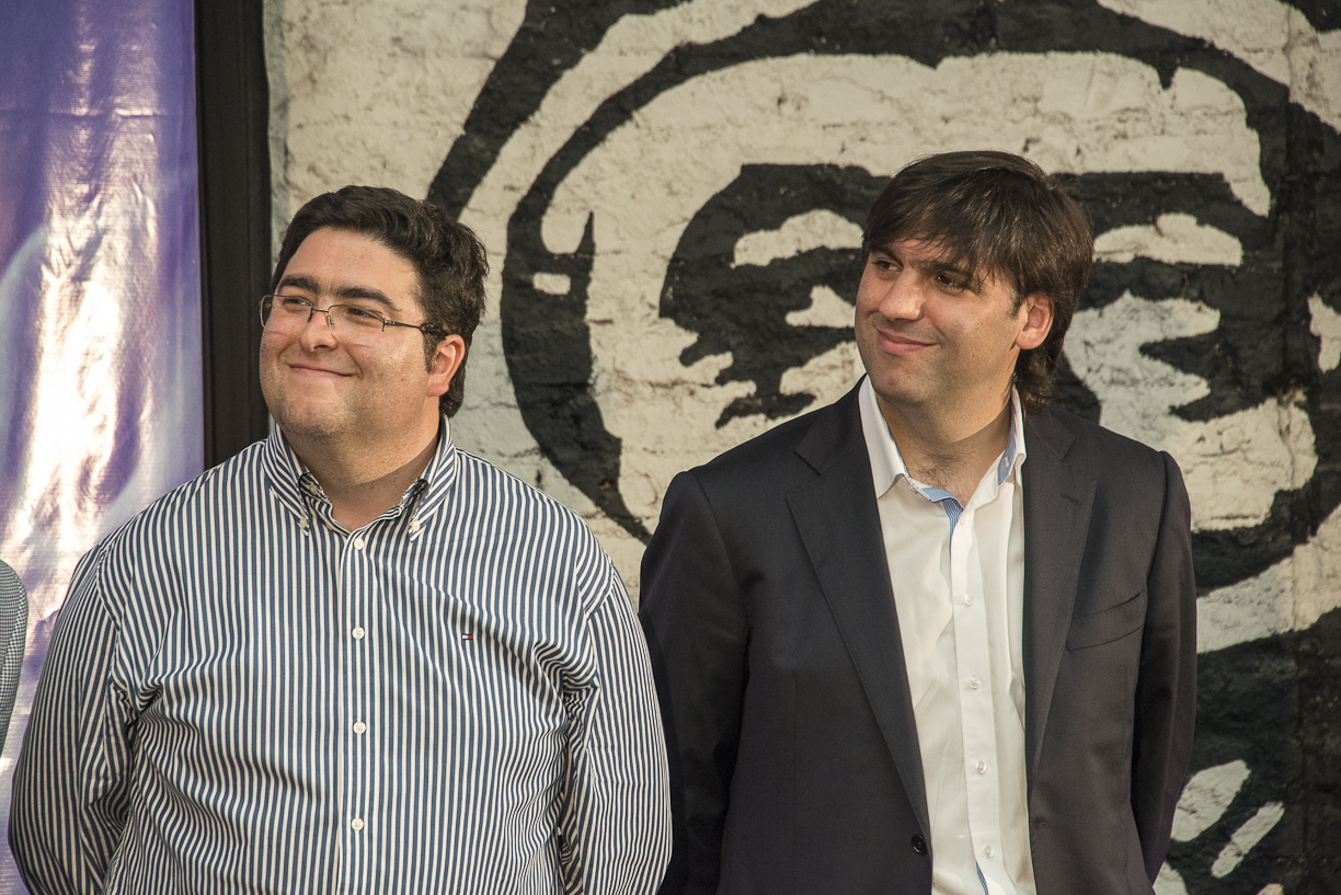 Pablo Bossio y Diego Bossio juntos